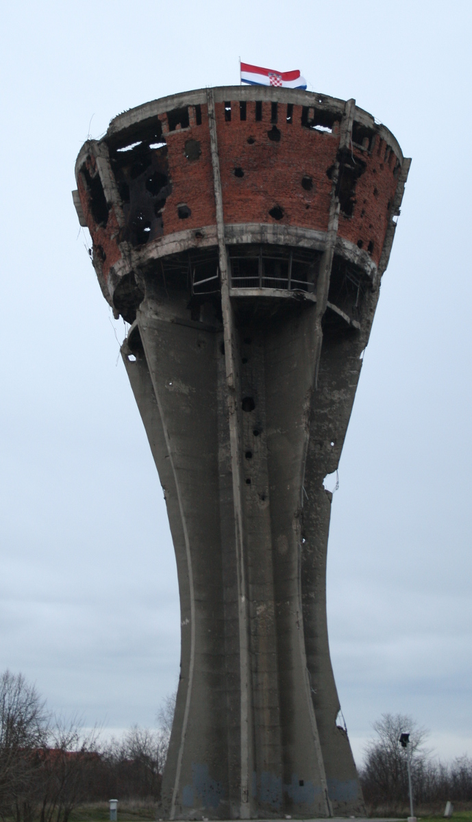 Vodotoranj u Vukovaru